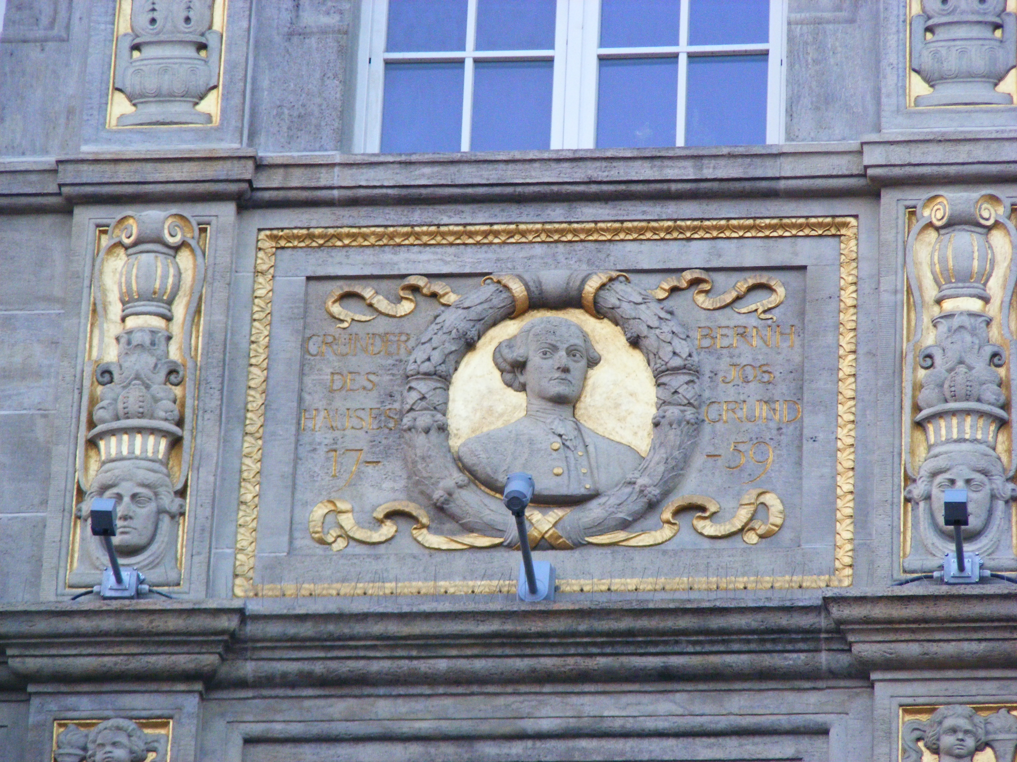 Wrocław w grudniu 2013.